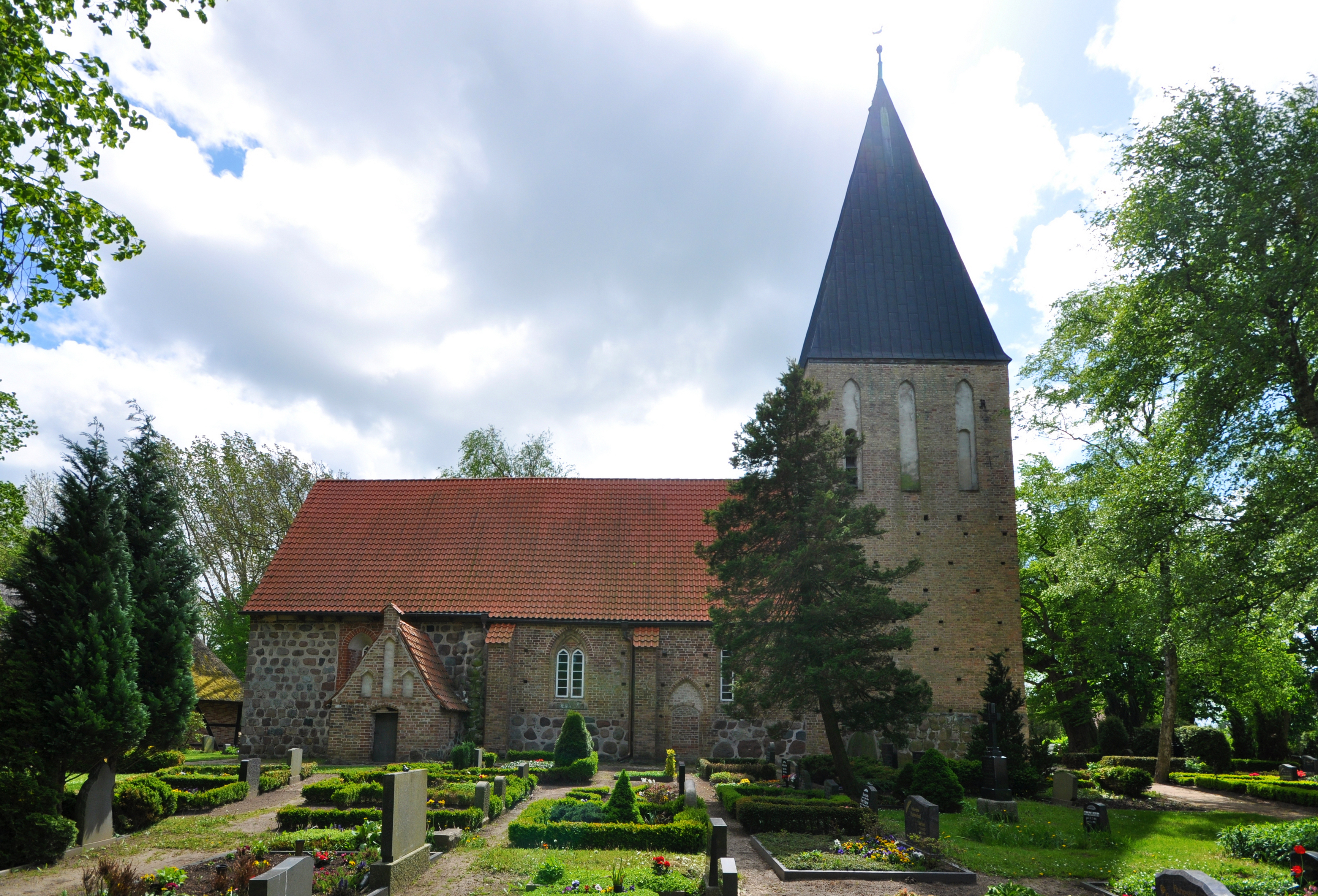 church in Lambrechtshagen